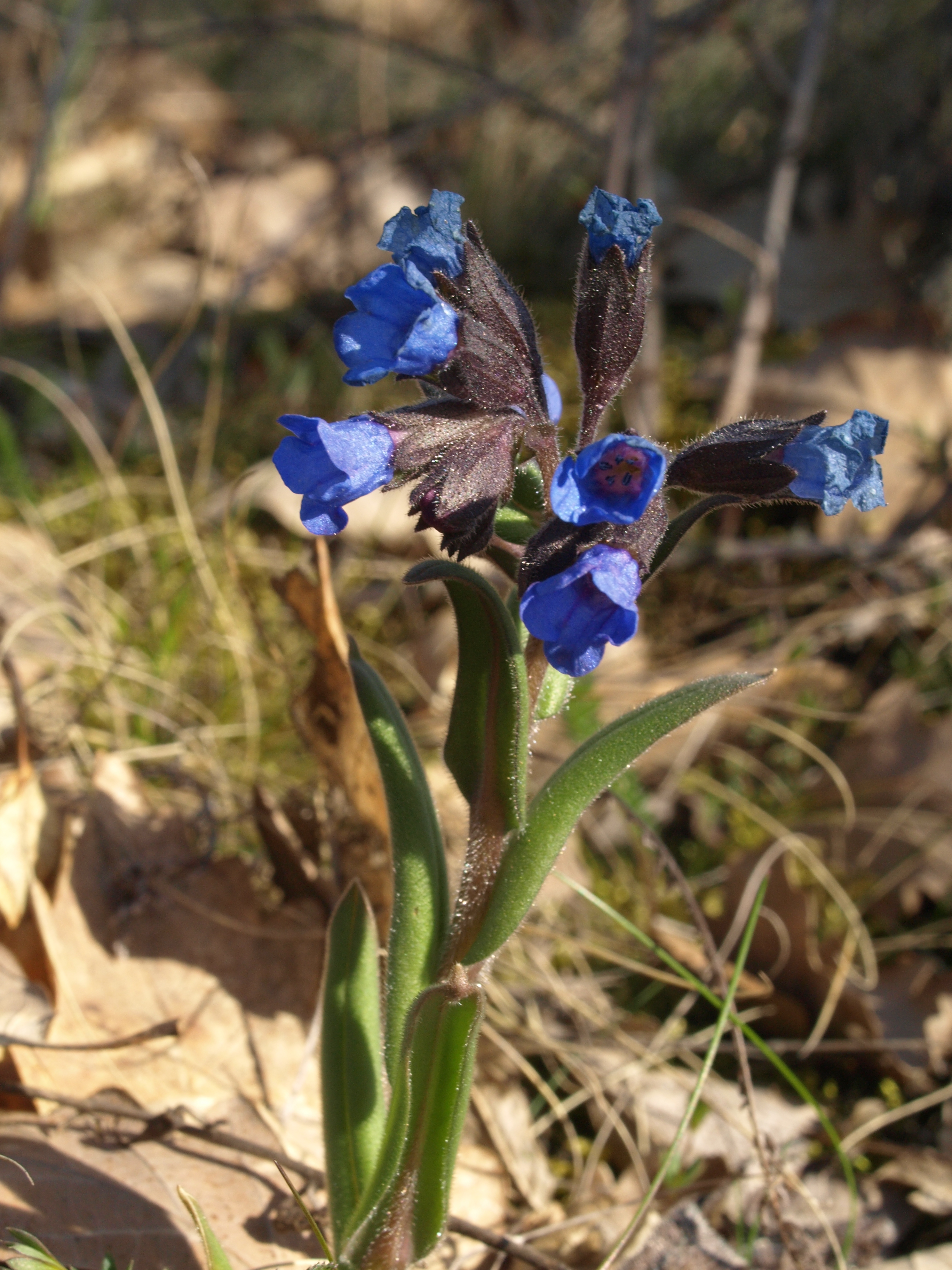 Dětaňský chlum (přírodní rezervace) - brzké jaro - Pulmonaria angustifolia L., plicník úzkolistý - status ohrožení v ČR: C2 (silně ohrožený)